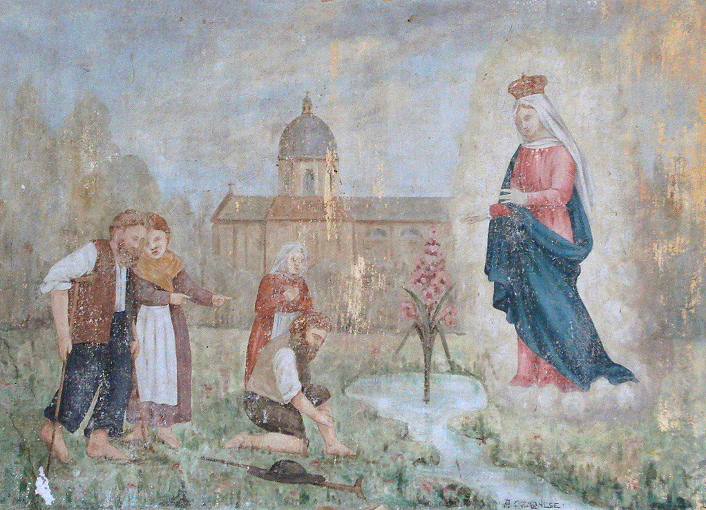 Pintura mural com cena de cura milagrosa por intervenção da Virgem de Caravaggio. Capela-mor da antiga Matriz de Caravaggio, Farroupilha, Brasil